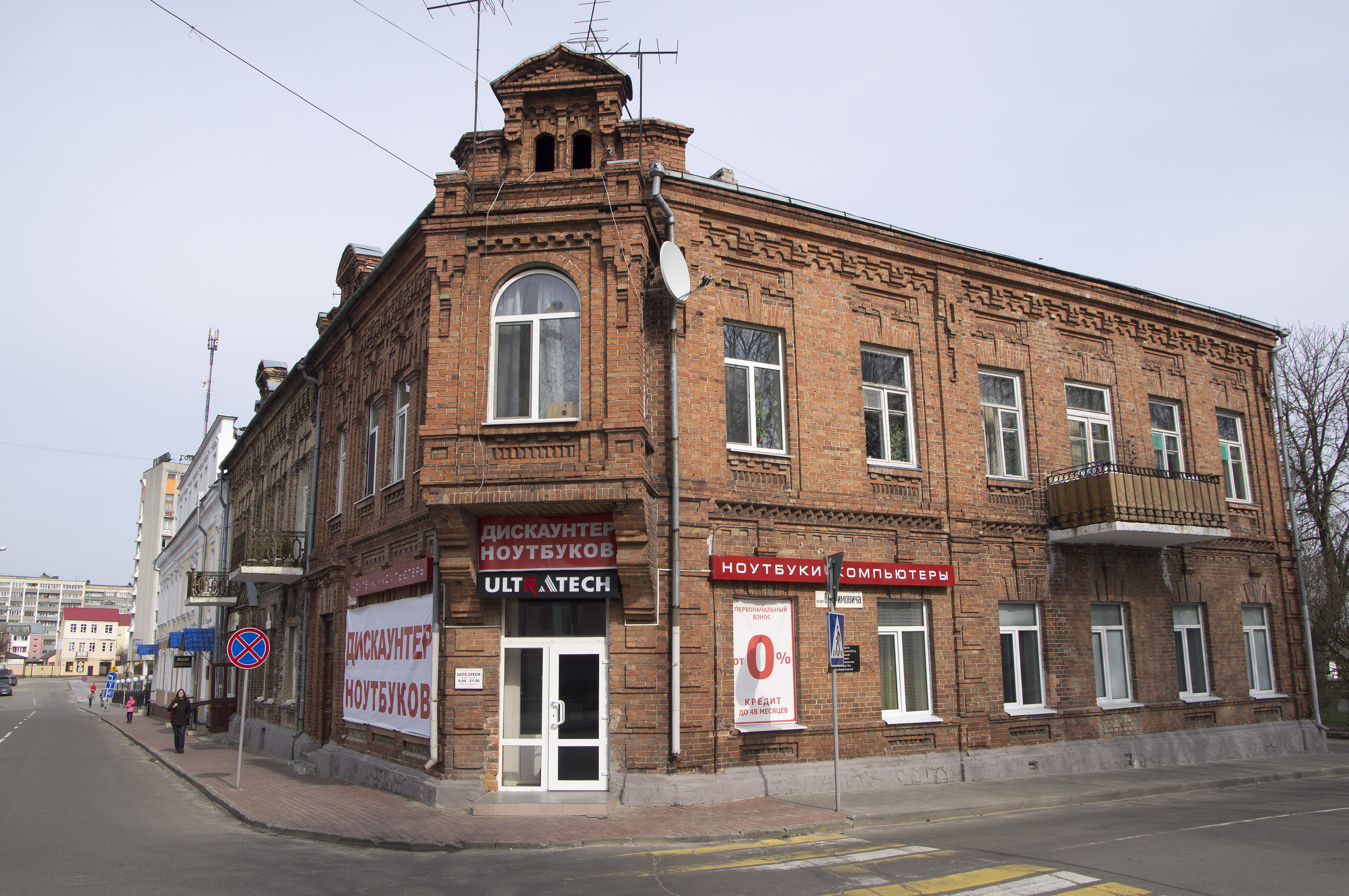 Беларуская (тарашкевіца): Гістарычны цэнтр г. Пінска: будынкі, збудаваньні, планіровачная структура, ландшафт і культурны пласт на тэрыторыі, абмежаванай з захадувул. Чарняхоўскага,з поўначы – вул. Завальнай, па мяжы дваровых тэрыторый дамоў № 1, 7,9, 11, 13, 19, 25, 27 па гэтай вуліцы, вул. Кірава, уключаючы дваровыя тэрыторыі дамоў № 1, 13 па вуліцы Кірава, з усходу – вул. Савецкай, у тым ліку дома № 5 па вул. Іркуцка-Пінскай Дывізіі, дома № 2 па вул. Кулікова, дома № 3 на пл. Кастрычніка, памяжы дваровых тэрыторый забудовы няцотнага боку дамоў № 1, 3па вул. Кіеўскай, да перакрыжаваньняз вул. Альхоўскіх, ад перакрыжаваньня з вул. Дняпроўскай Флятыліі,па вул. Дняпроўскай Флятыліі, уключаючы дваровыя тэрыторыі дамоў№ 39, 41 гэтай вуліцы, з поўдня —левым берагам р. Піна да перасячэньня з вул. Чарняхоўскага. г. Пінск This is a photo of Belarusian heritage monument. Reference number: 112Е000529 ( WLM)